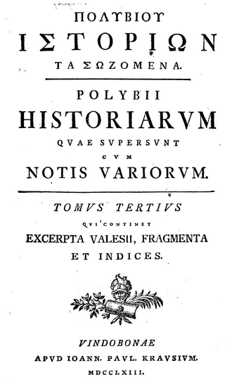 Historiarvm Qvae Svpersvnt, 1763, Polybius